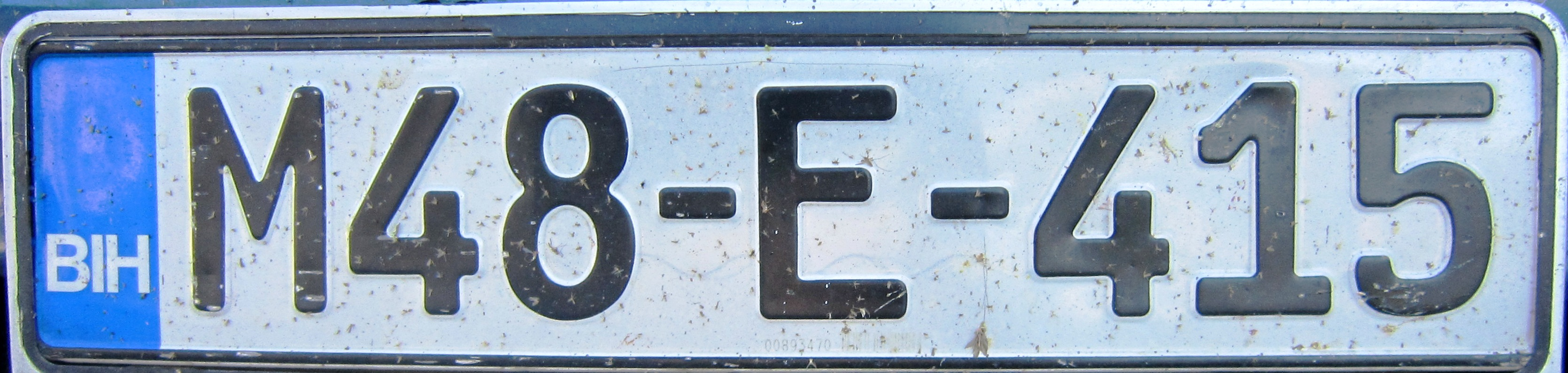 Bosnia and Herzegovina new license plate